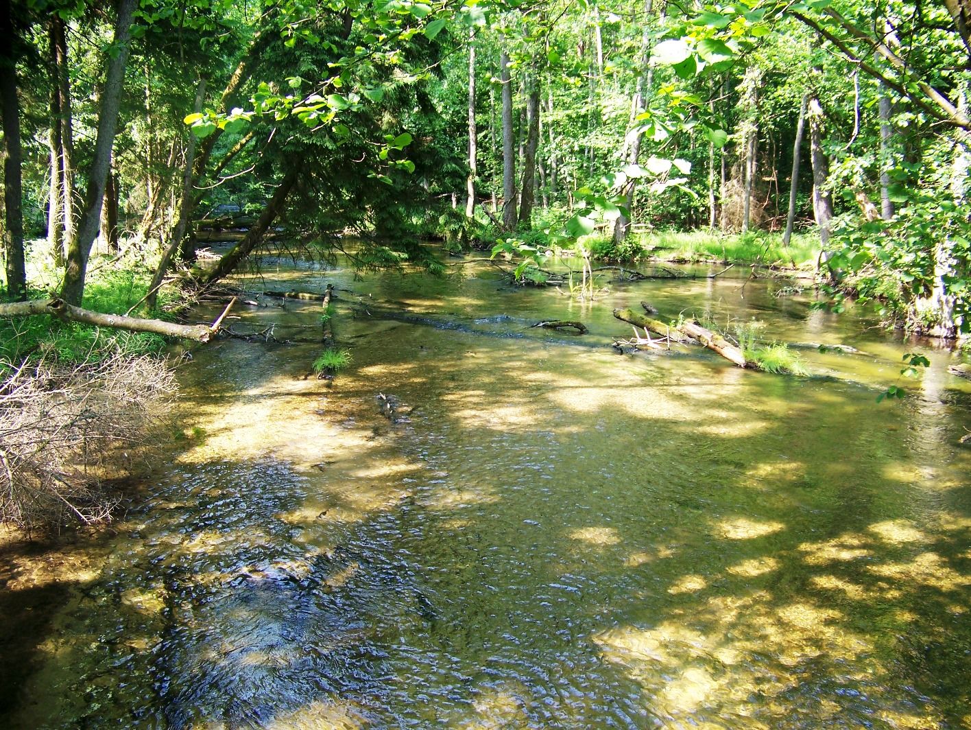 Za spiętrzeniem Węgorni - "most za Węgornią", Drawieński Park Narodowy